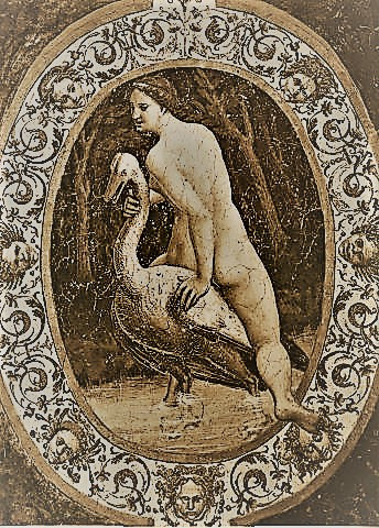 Ritratto della contessa Angela de' Rossi Vitelli (1507-1573), nelle vesti di "Leda col cigno"